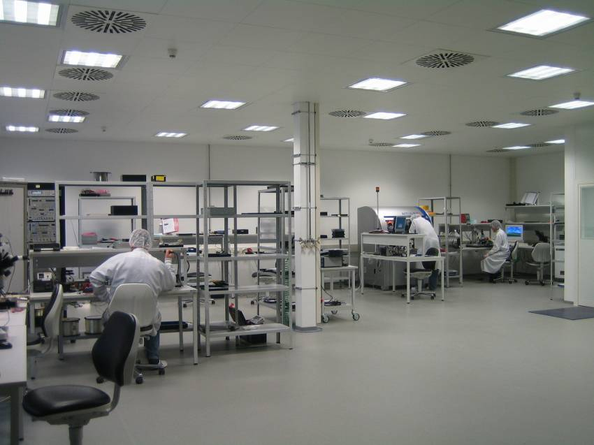 Reinraum Aifotec in Meiningen, Thuringia, Germany